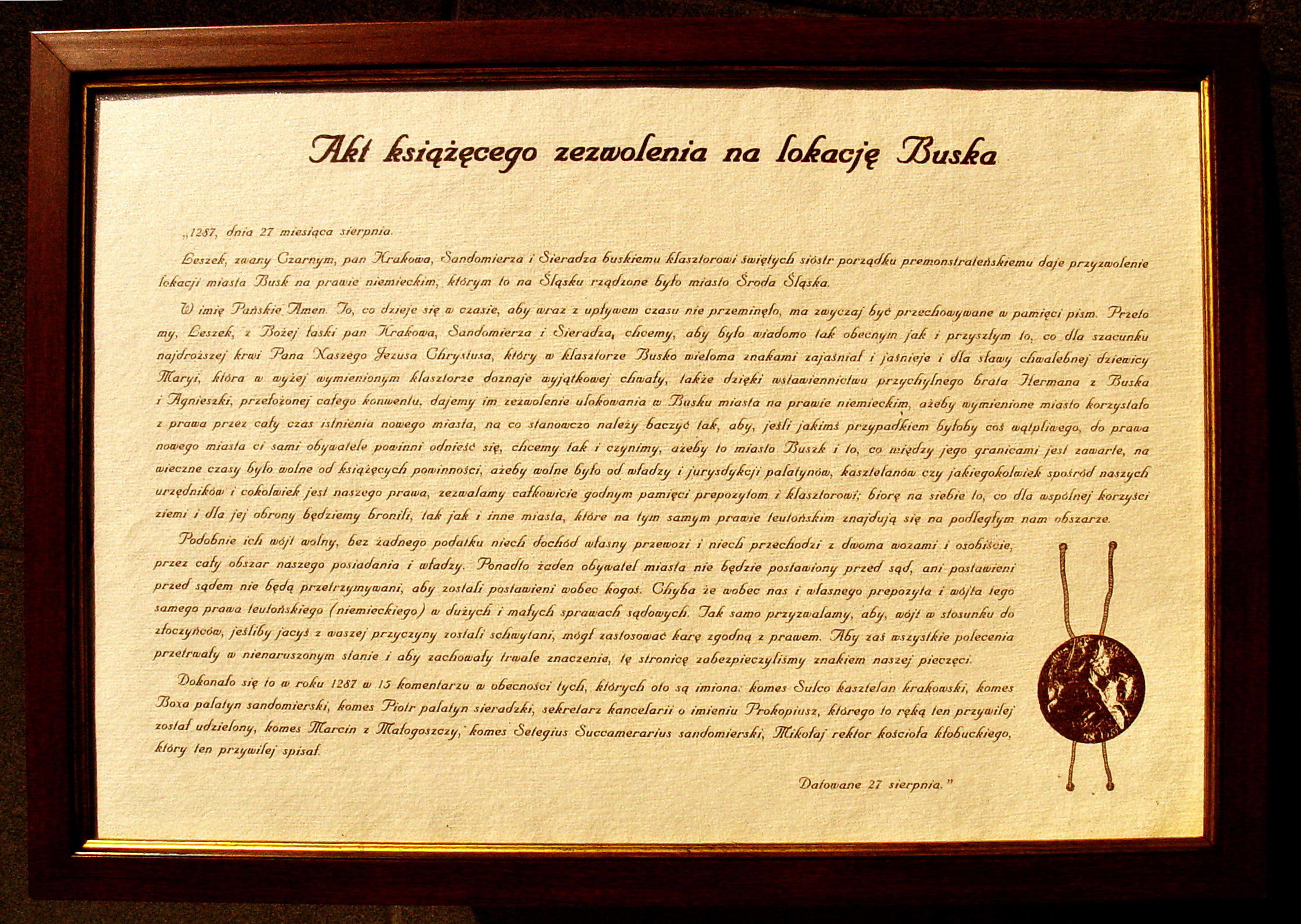 Akt lokacji Buska, współczesne wyobrażenie